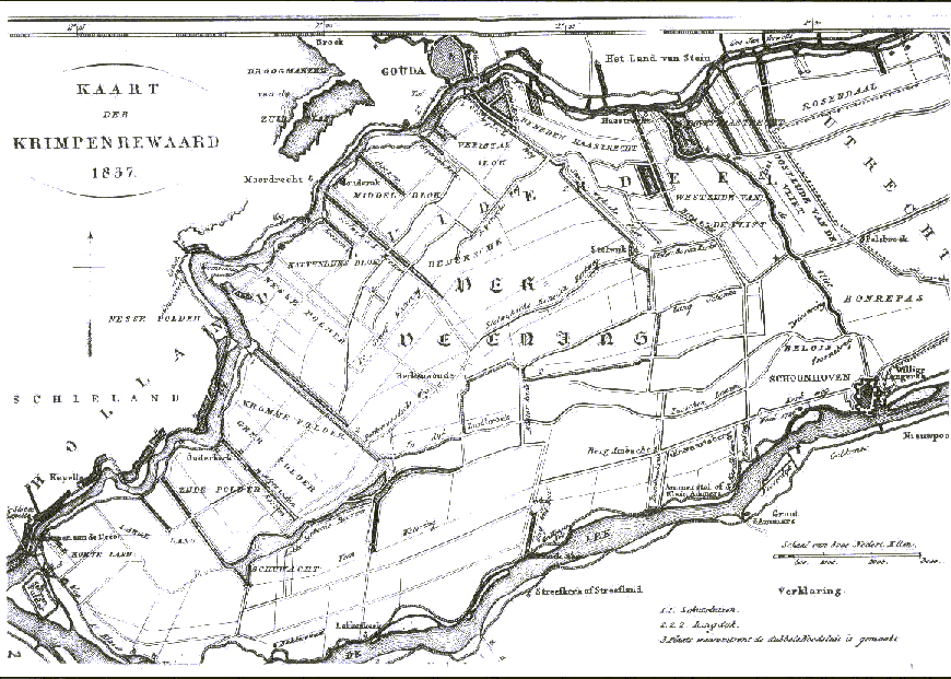 kaart 1837 van Krimpenerwaard, wegens ouderdom PD